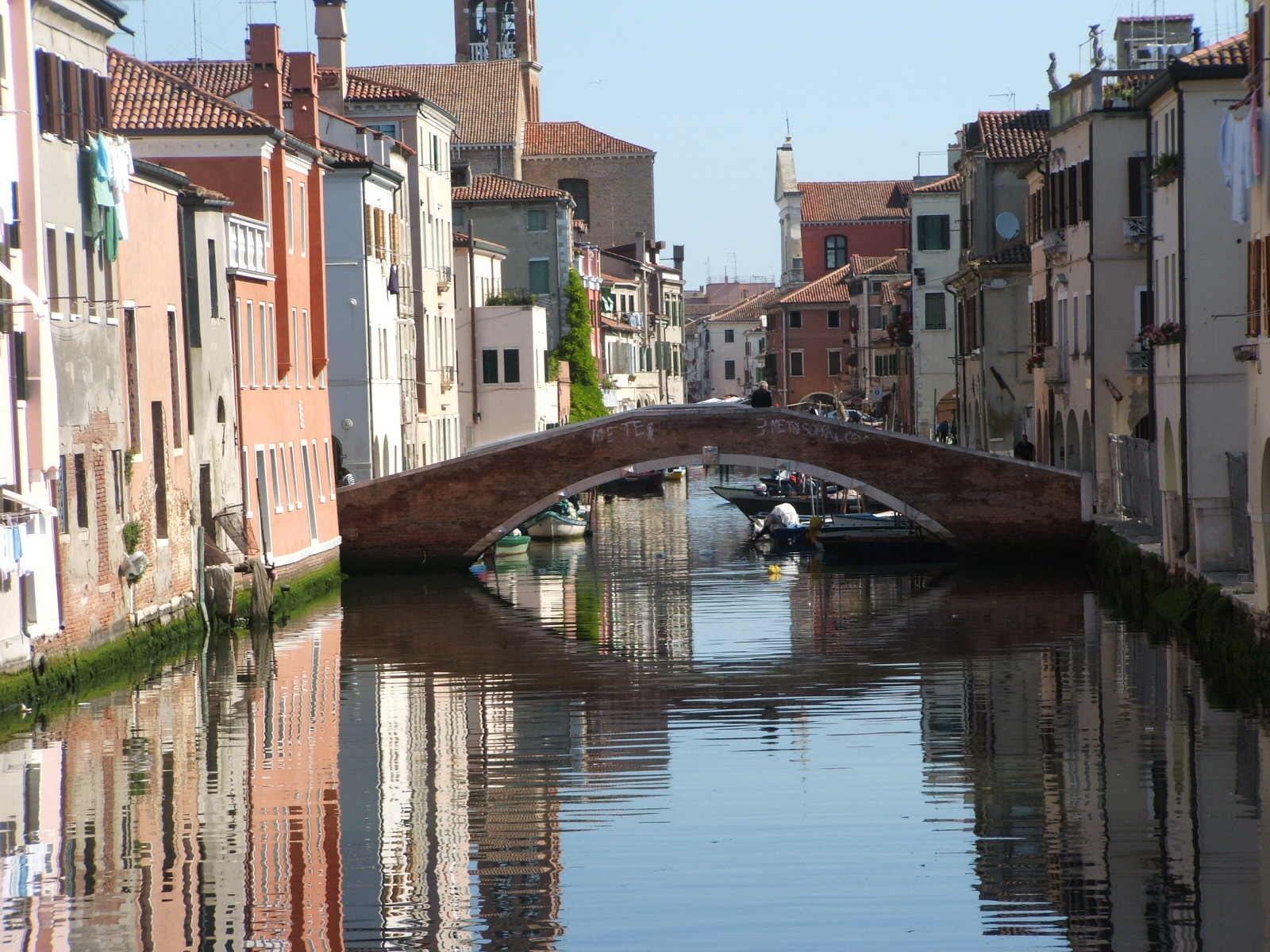 Chioggia, laguna veneta - Ponte sul Canal Vena